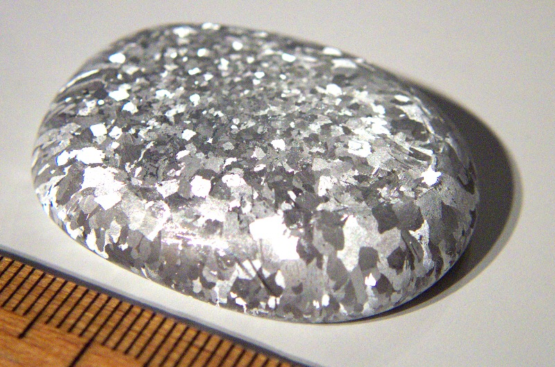 Aluminium, reinst 99,9%, geätzt mit deutlich sichtbaren Kristalliten